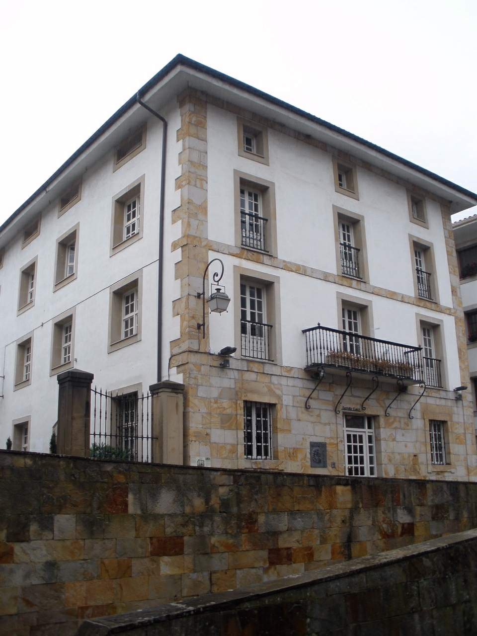 Aizpurunea Etxea (Urretxu, Gipúzkoa)